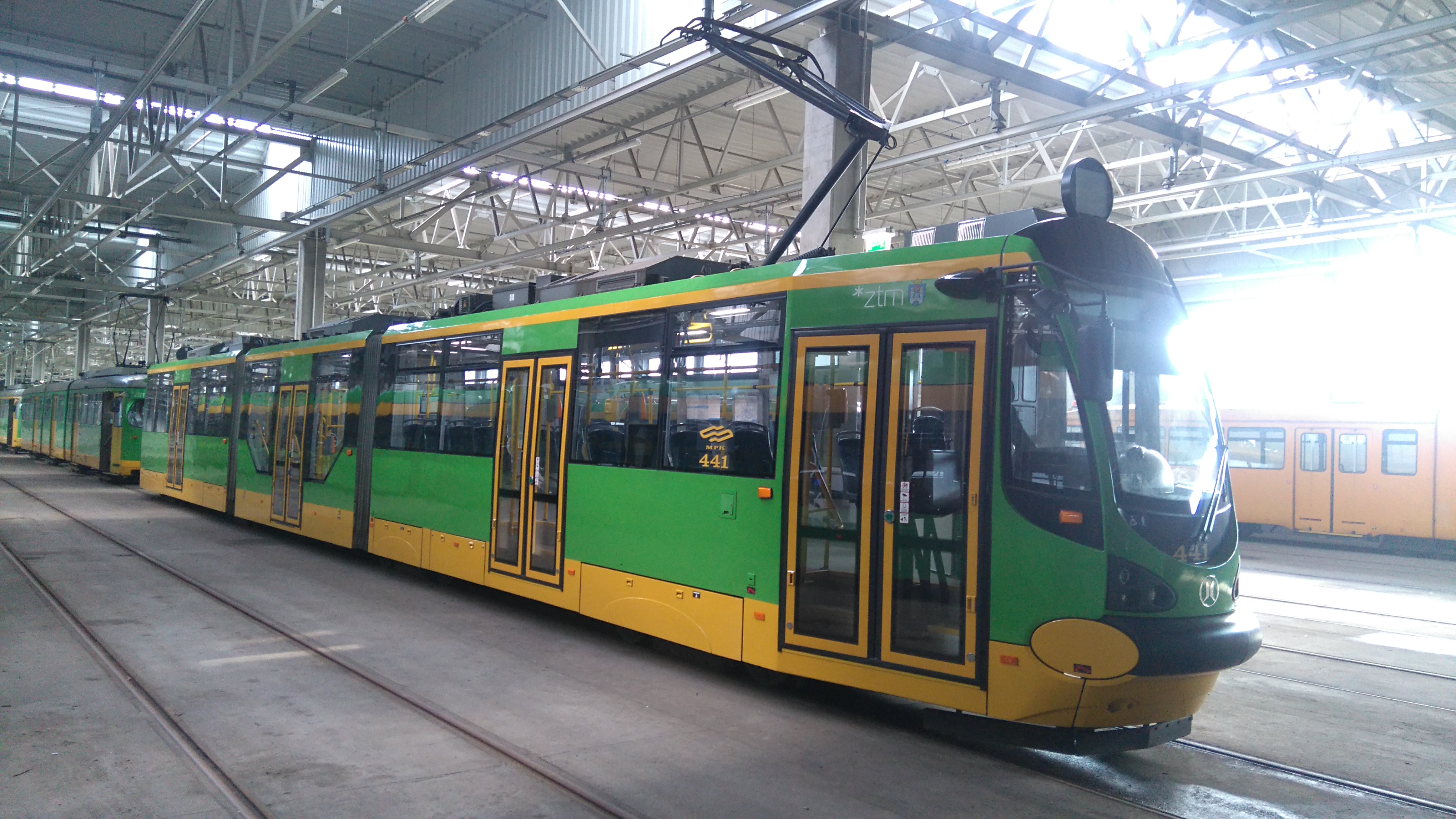 Wagon Moderus Beta MF 20 AC #441 na terenie zajezdni Franowo